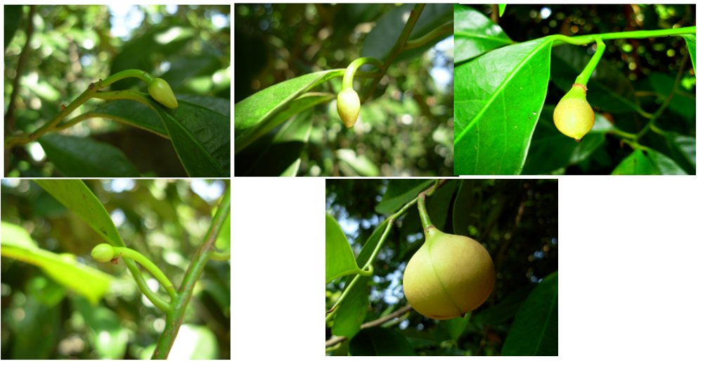 ജാതിക്ക പല ഘട്ടങ്ങളിൽ